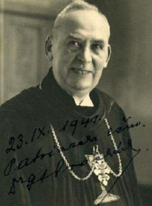 Gustav Adolf Procházka (1872 - 1942), Český teolog a pedagog.